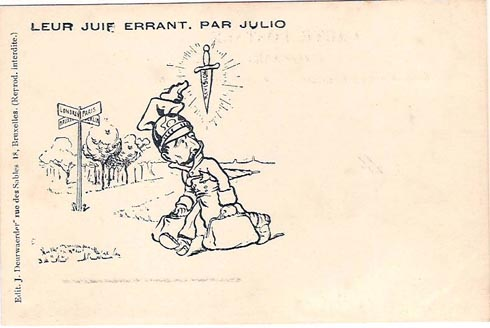 Esterhazy représenté en "Juif errant", par Julio, dans la journal belge La Réforme, 1898.